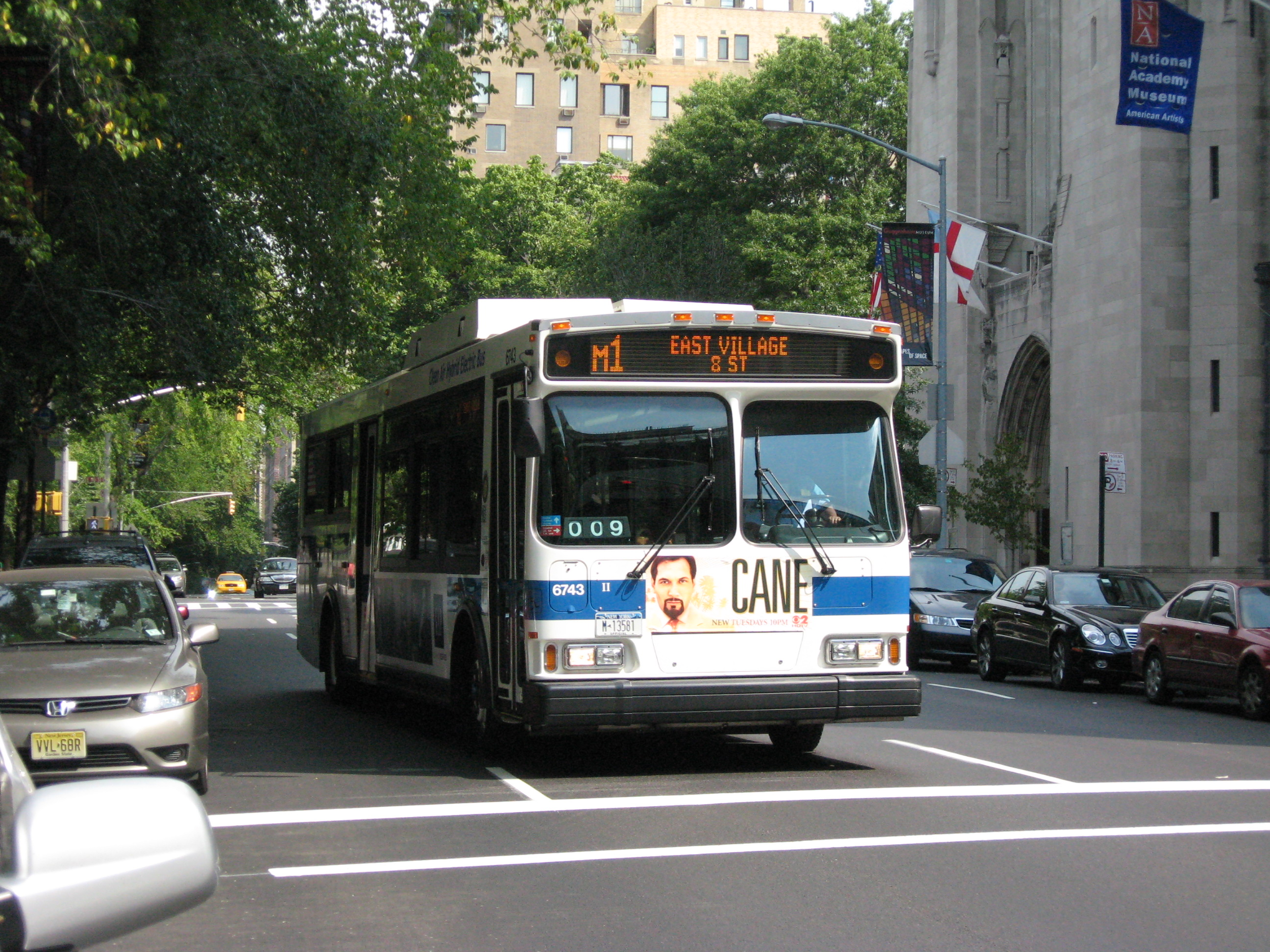 MTA BUS